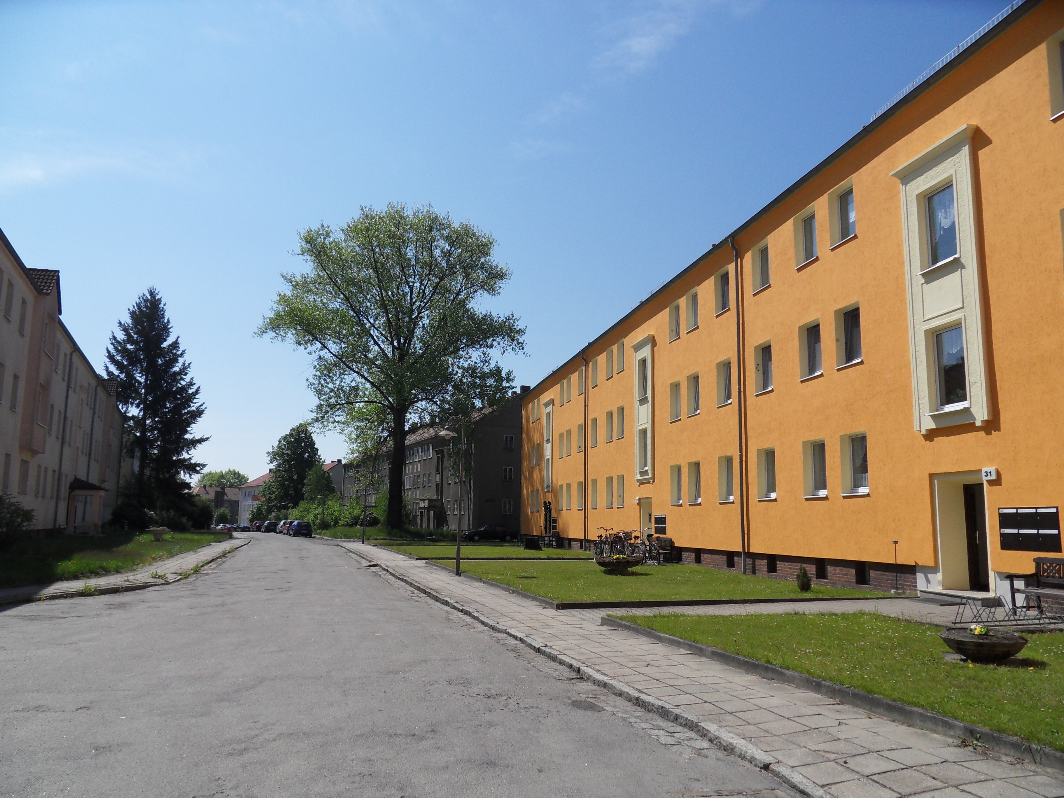 Denkmalgeschützter Wohnkomplex “Neustadt I” in der Grünewalder Straße in Lauchhammer-Mitte